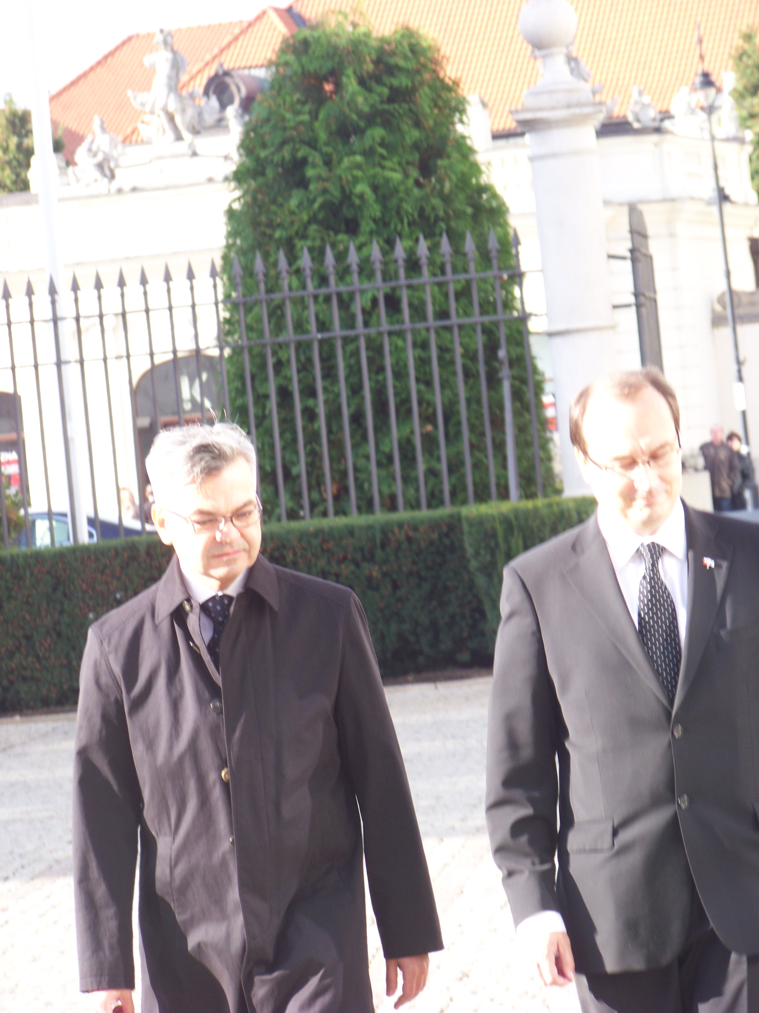 Prezydent RP Bronisław Komorowski przyjmuje listy uwierzytelniające od nowo powołanych ambasadorów Chin, Finlandii, Danii, Węgier i Urugwaju w Polsce.